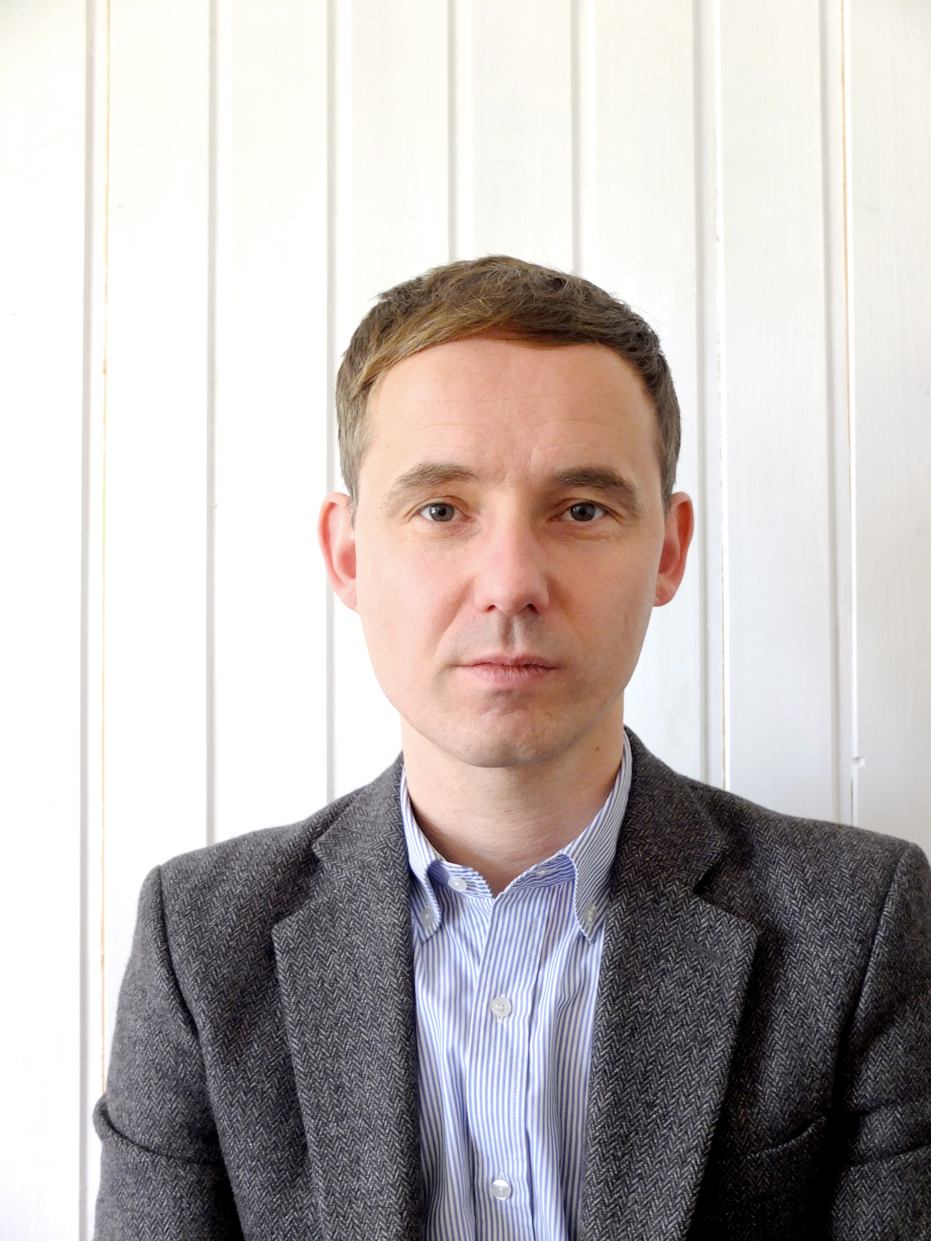 Bastian Asdonk, fotografiert von Erik Niedling